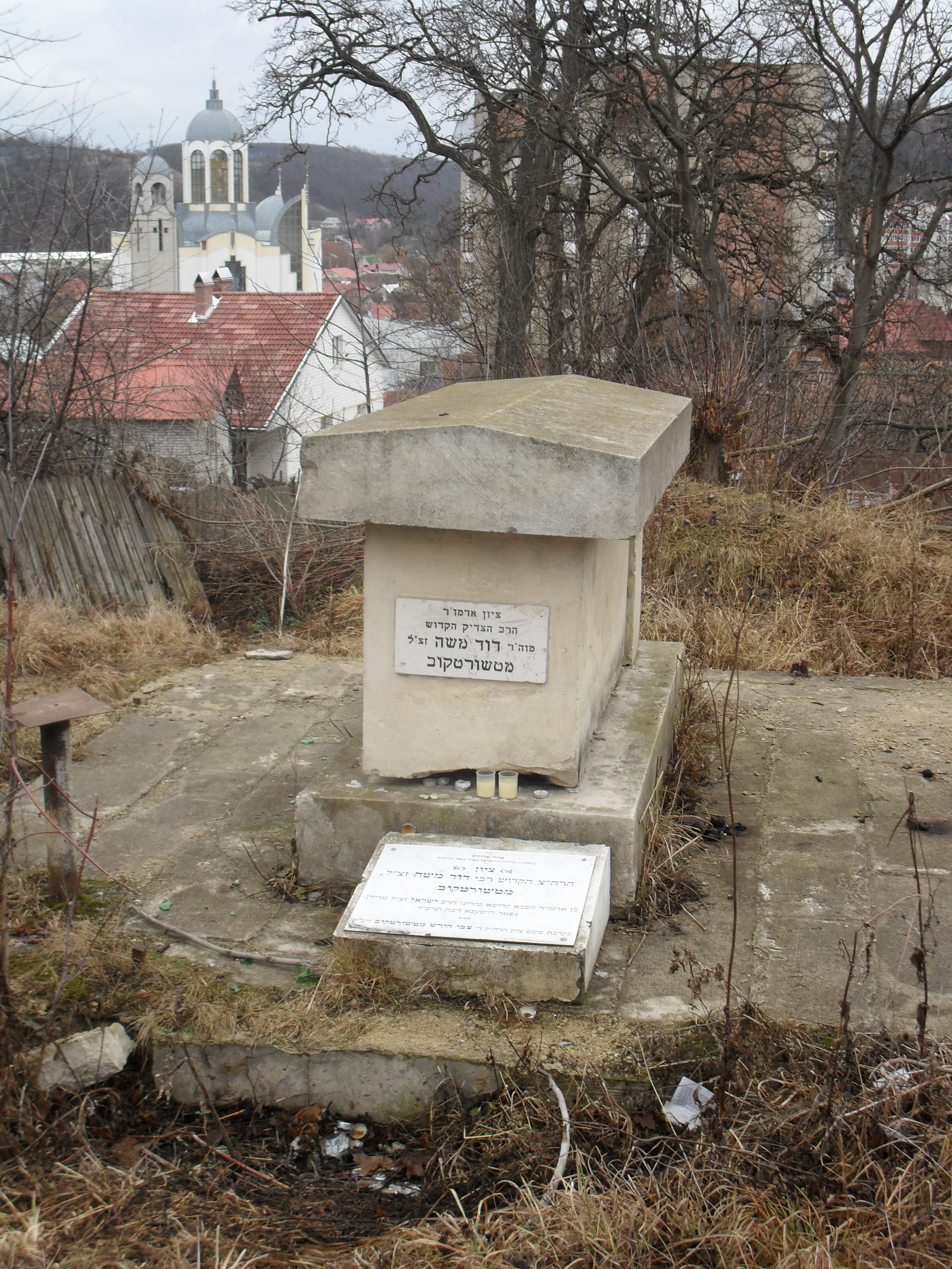 м. Чортків. Могила провідника хасидизму Давида Моше